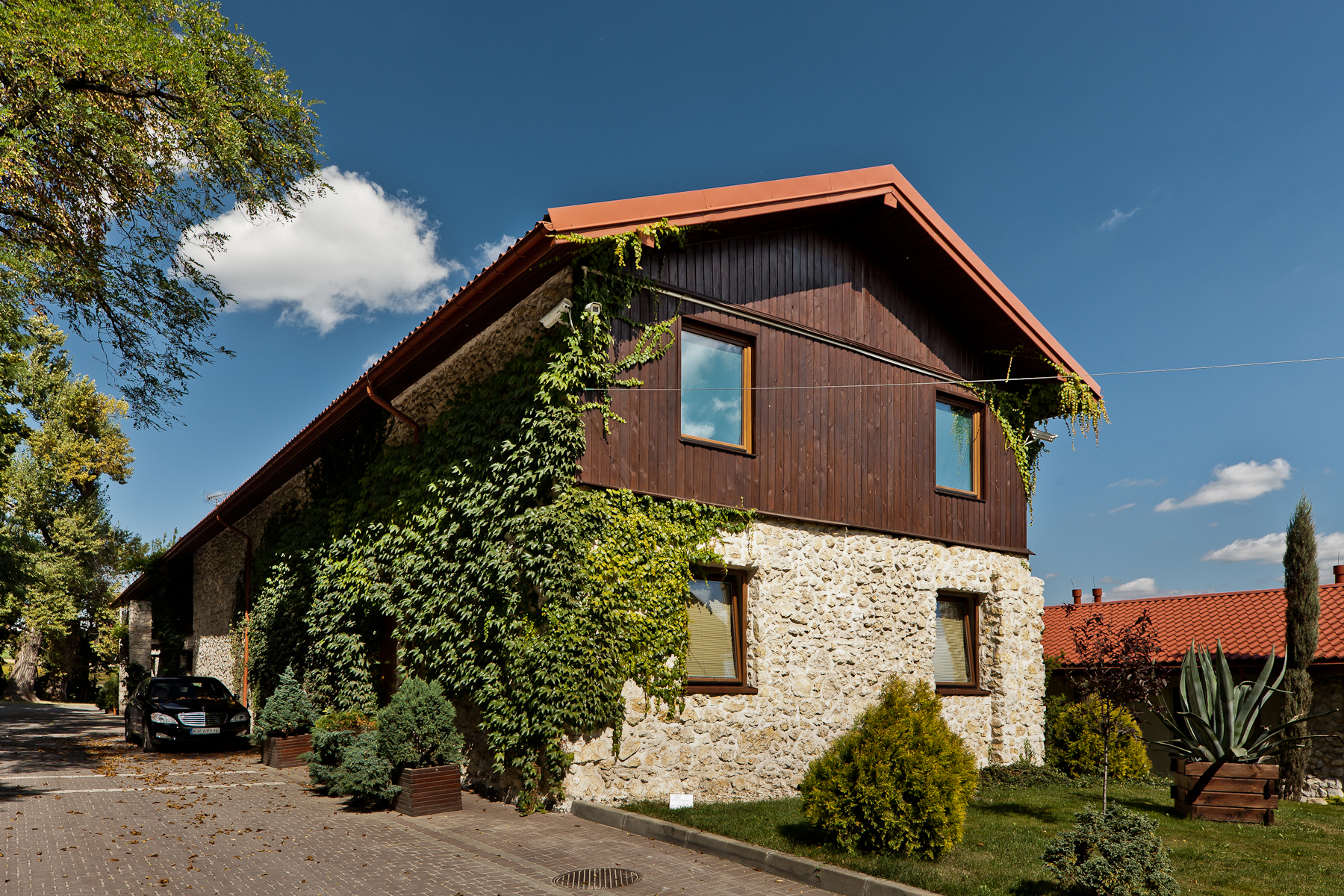 Zespół dworski, Tomaszowice - odrestaurowane zabudowania gospodarcze